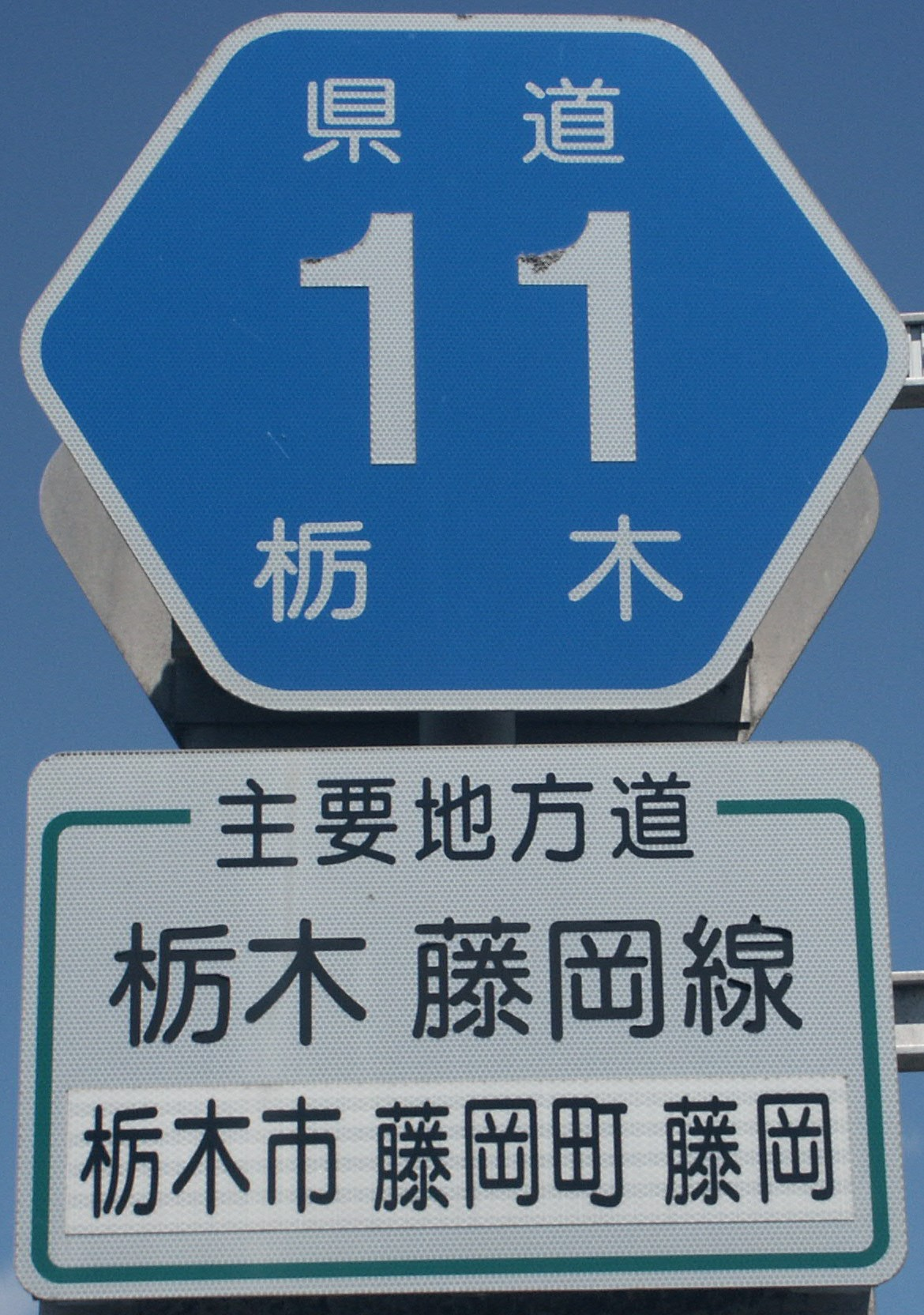 栃木県道11号線の路線番号標識